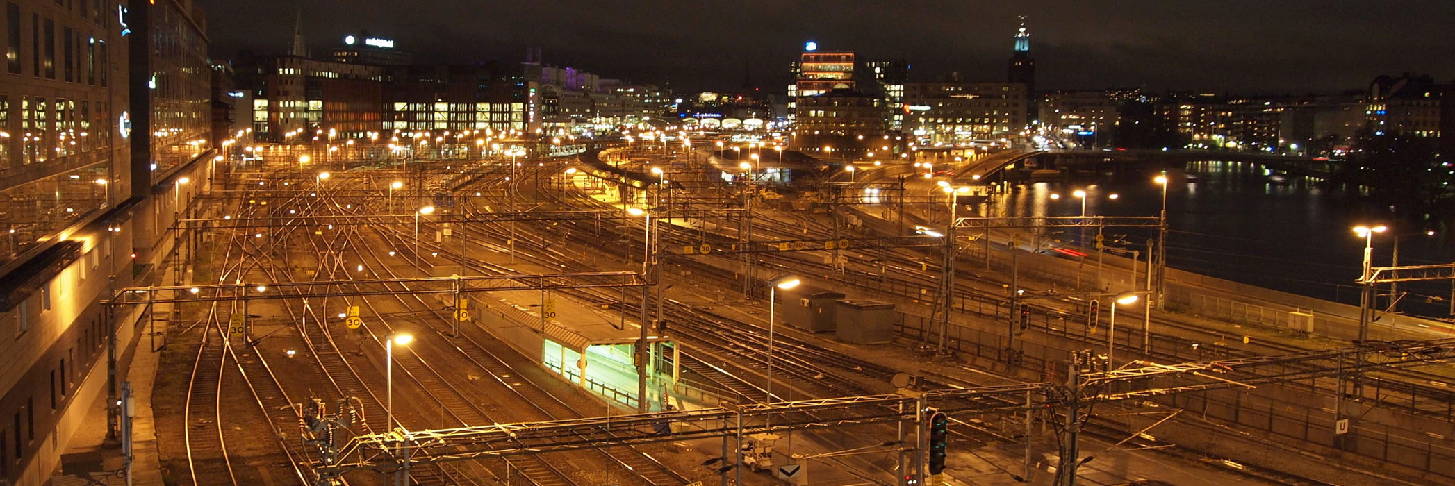 Bangården Stockholms central (norra del)